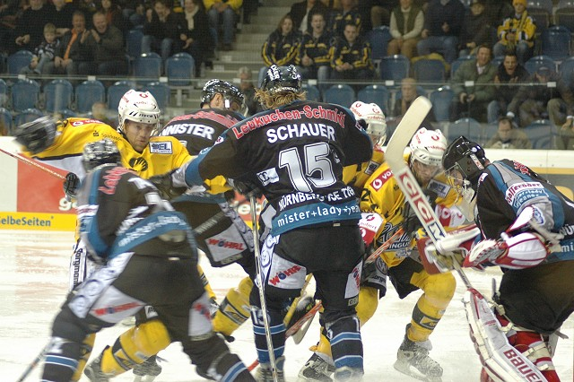 Krefeld Pinguine - Nürnberg IceTigers